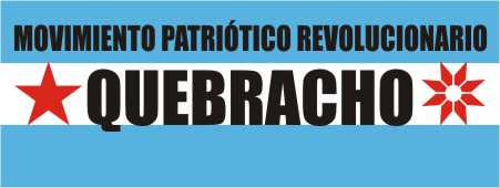 Insignia del Movimiento Patriotico Revolucionario Quebracho